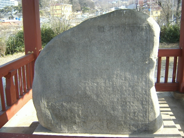 창녕 신라 진흥왕 척경비